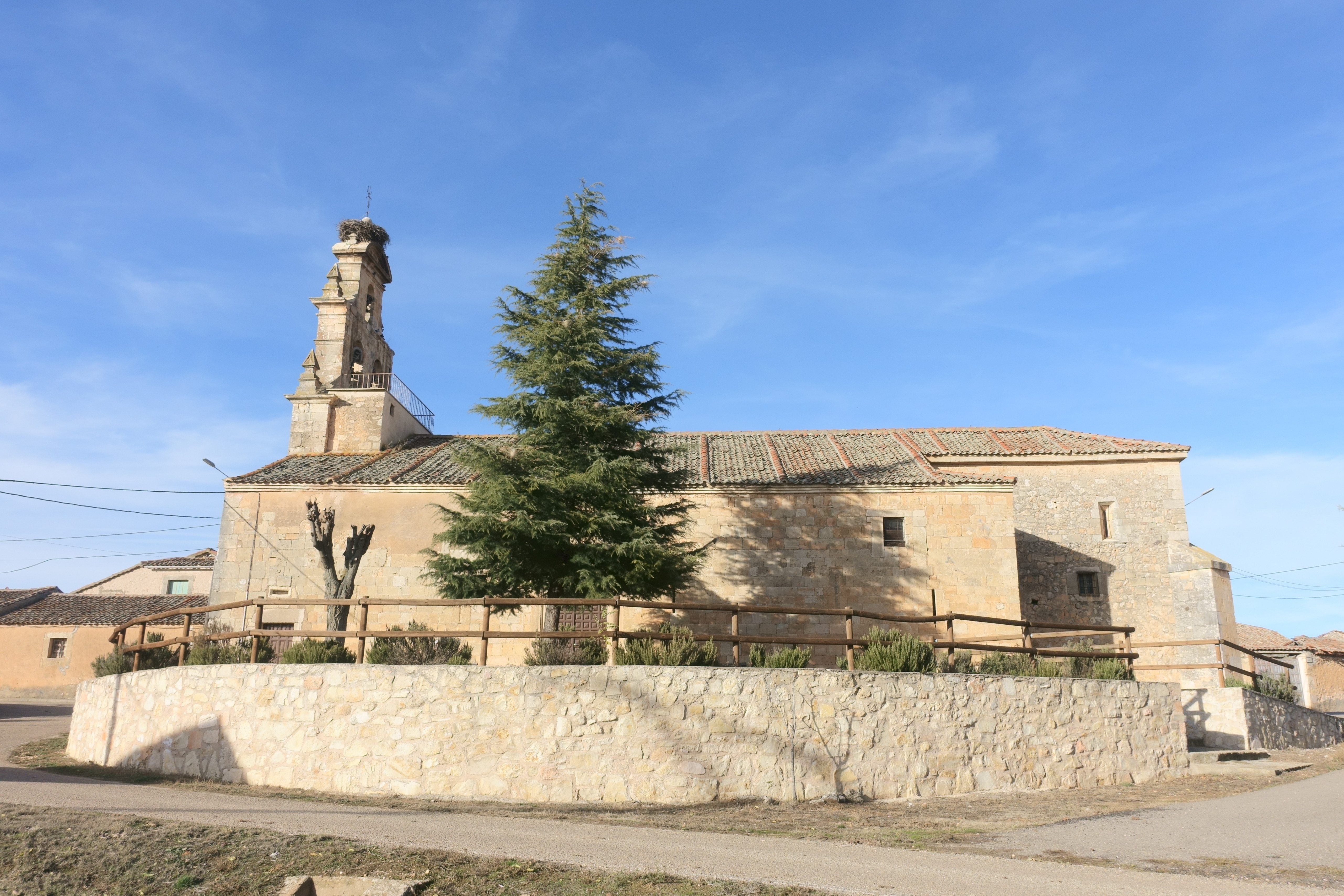 Iglesia de San Mamés, Cilleruelo de San Mamés (Segovia, España).